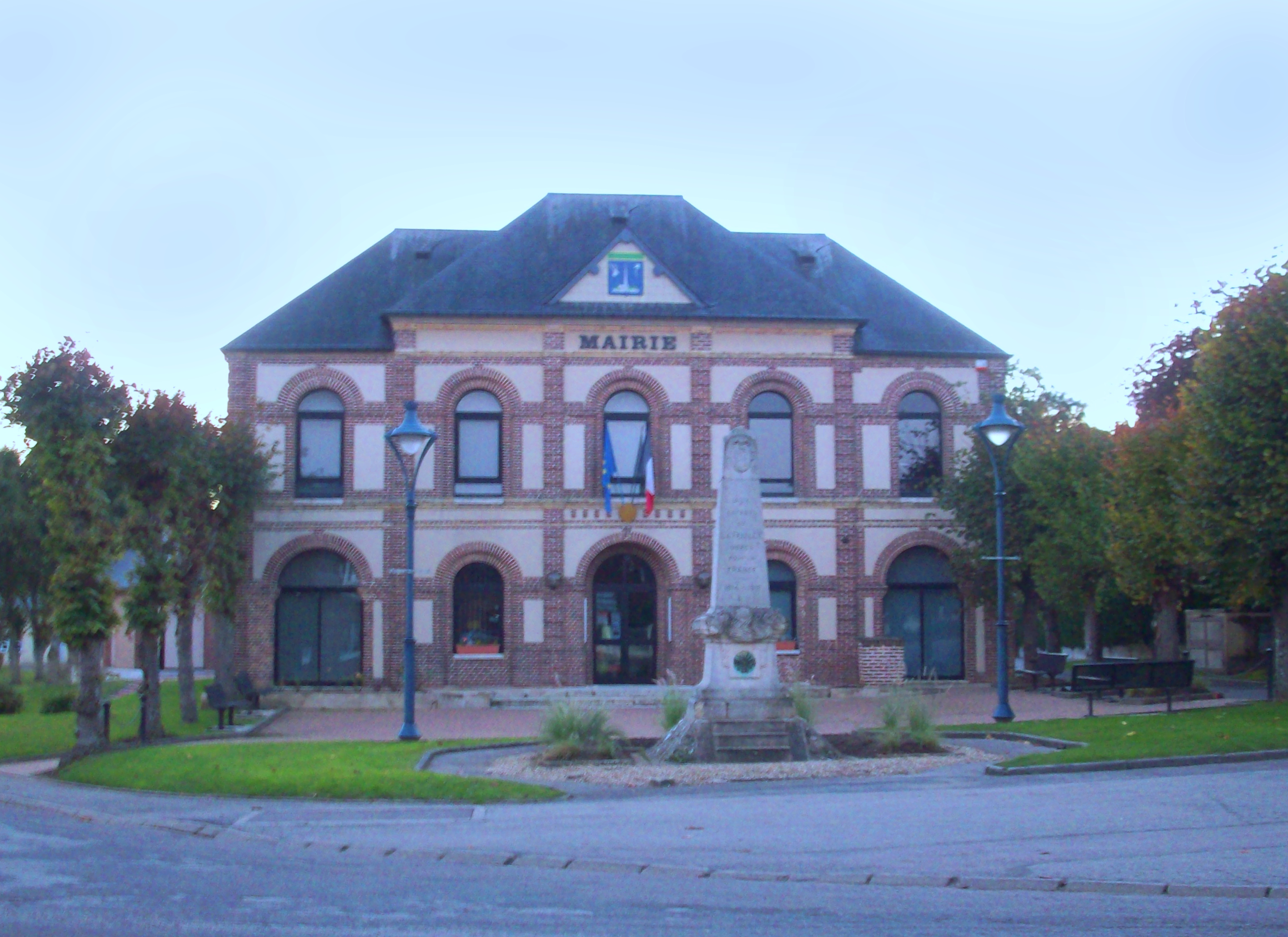 Mairie de la Feuillie.